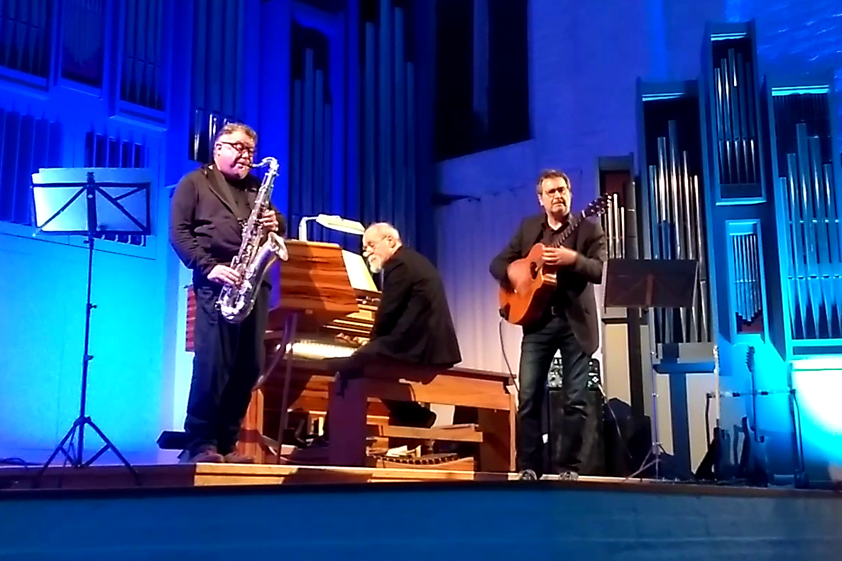 Choral Concert: Karl Scharnweber, Thomas Klemm, Wolfgang Schmiedt. Konzert am 17. Dezember 2019 in der Nikolaikirche Rostock.